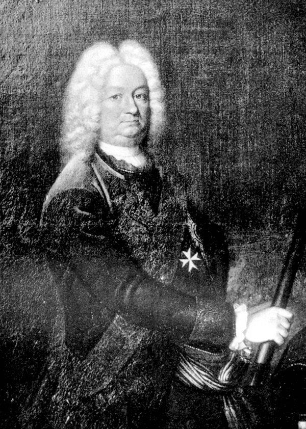 Portrait of Albrecht Konrad Graf Finck von Finckenstein (1660–1735)